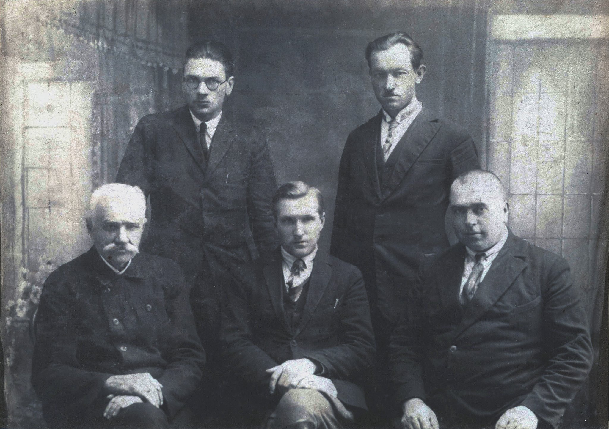 Pirmosios tarpukario Kretingos žemės ūkio parodos, vykusios 1929 m. rugpjūčio 15–16 d., organizacinio komiteto narių grupinis portretas, darytas Kretingos fotografo Alfonso Survilos fotografijos salone. I eilėje iš kairės į dešinę – veterinarijos gydytojas Šalkauskis, agronomas Tautvydas, Kretingos burmistras Jonas Paulauskas; II eilėje – agronomai grafas Kazimieras Tiškevičius ir Jonas Daulenskis.